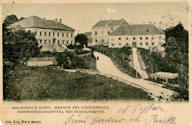 Koncert Marija Kogoja je potekal na gradu Kamen v Novem mestu (levo). Razglednico hrani Knjižnica Mirana Jarca Novo mesto.